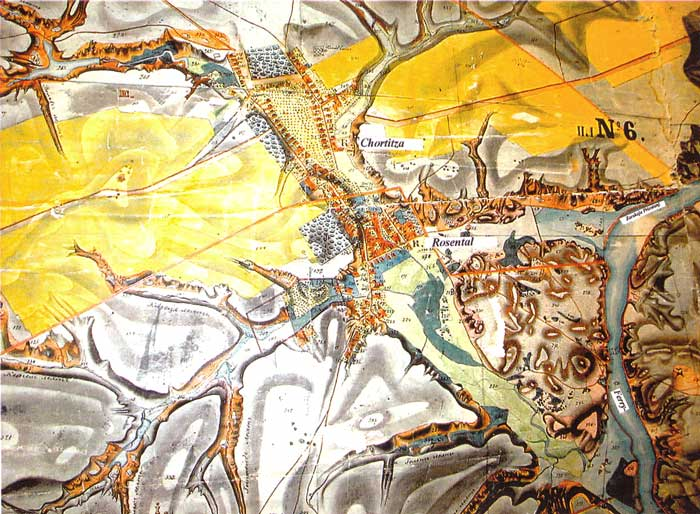 The map Rozental-Khortitsa Colony, 1867